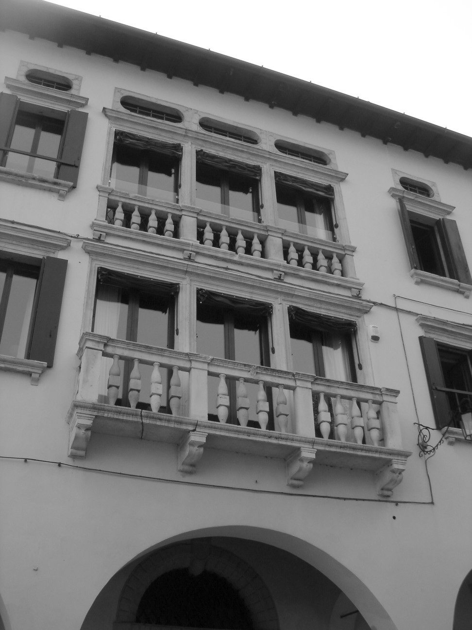 Serravalle di Vittorio Veneto (Treviso): particolare con trifore di palazzo Stella.